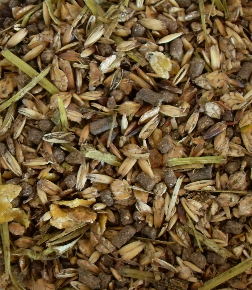 Kraftfutter, Müsli